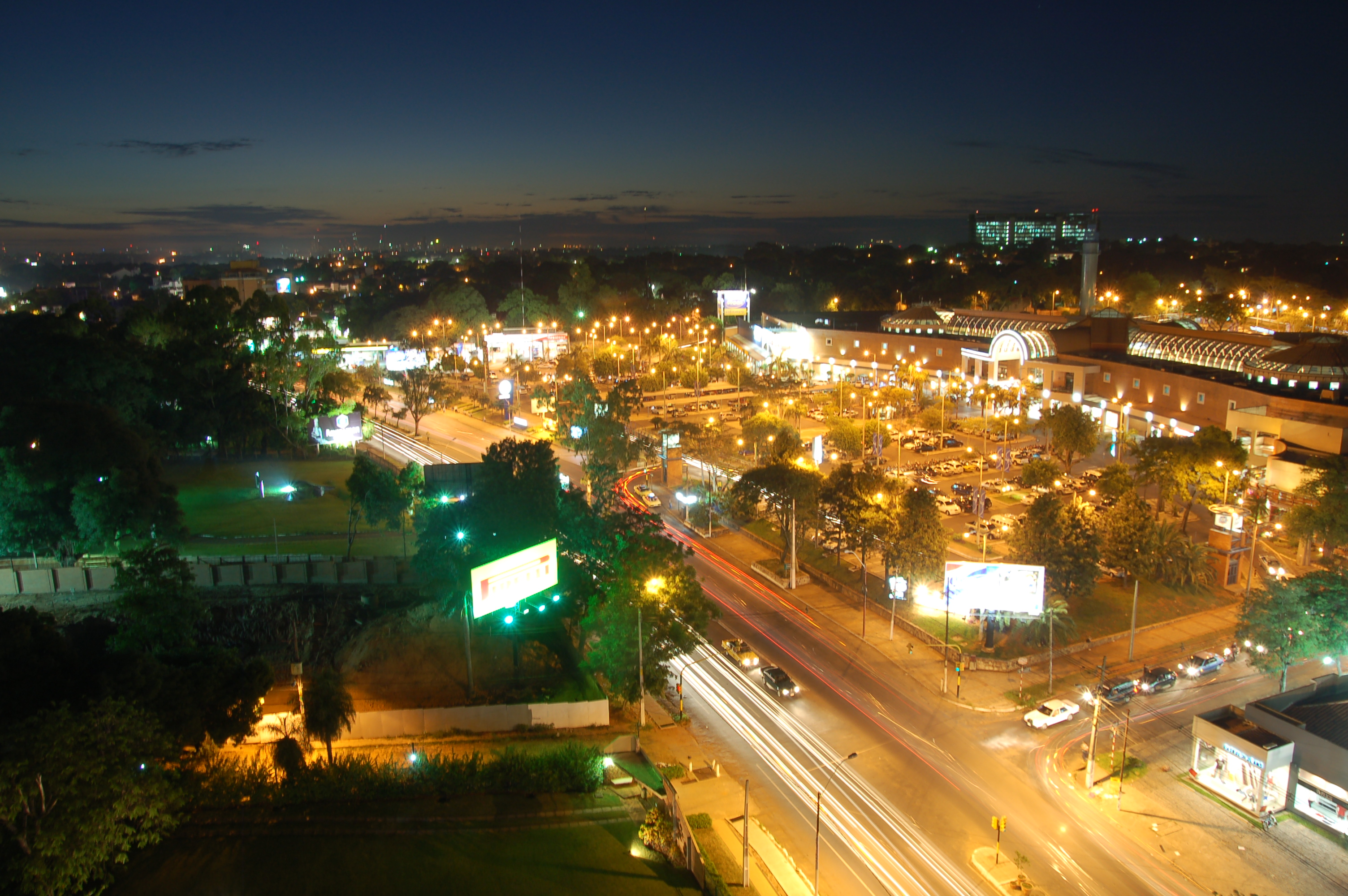 La calle más visible es la Avenida Aviadores del Chaco, mientras que la jungla de luces es el famoso Shopping del Sol. Asunción Paraguay. La fotografía fue tomada desde la azotea del Hotel Sheraton Asunción, ubicado a una cuadra del Shopping.